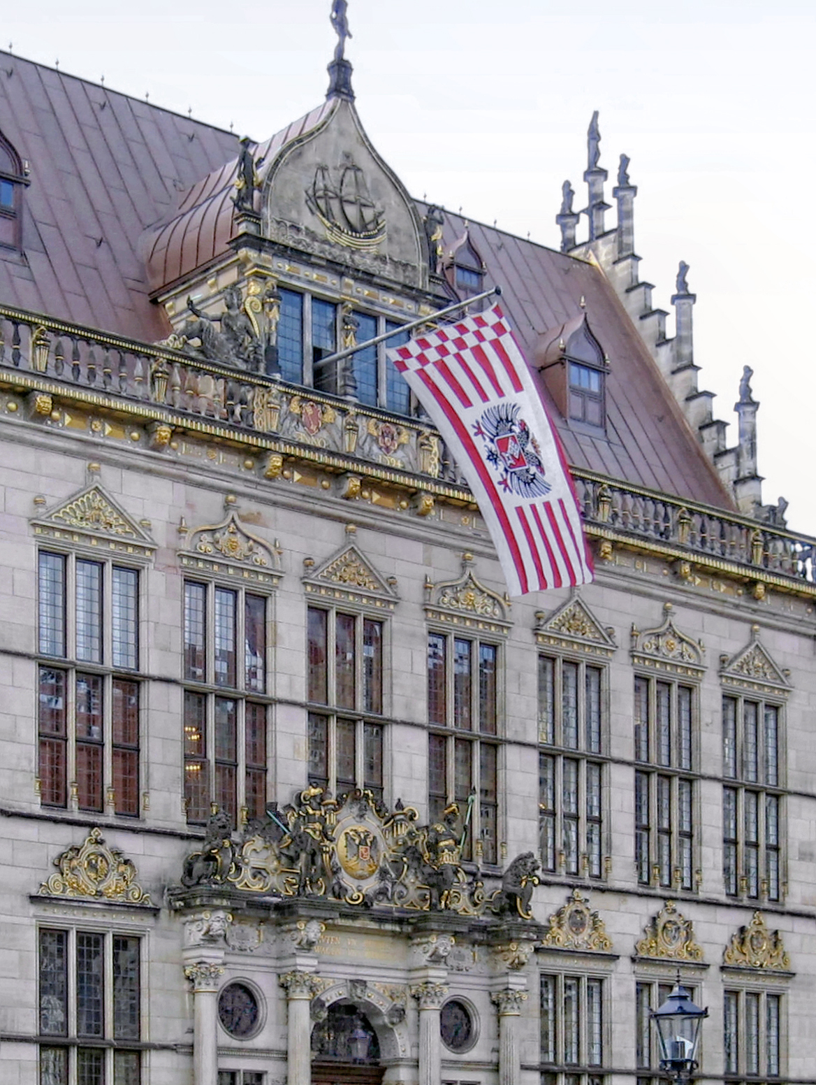 Teilansicht von Haus Schütting am Bremer Marktplatz, Sitz der Handelskammer Bremen (hier mit Flaggenschmuck am Tage der 467. Schaffermahlzeit 2011). Details an der Marktfront: Schiffsgiebel mit Koggen-Motiv, Bremische Flagge mit dem Bremer Kaufmannswappen sowie Schmuckgiebel über dem Eingangsportal mit dem Bremer Kaufmannswappen.